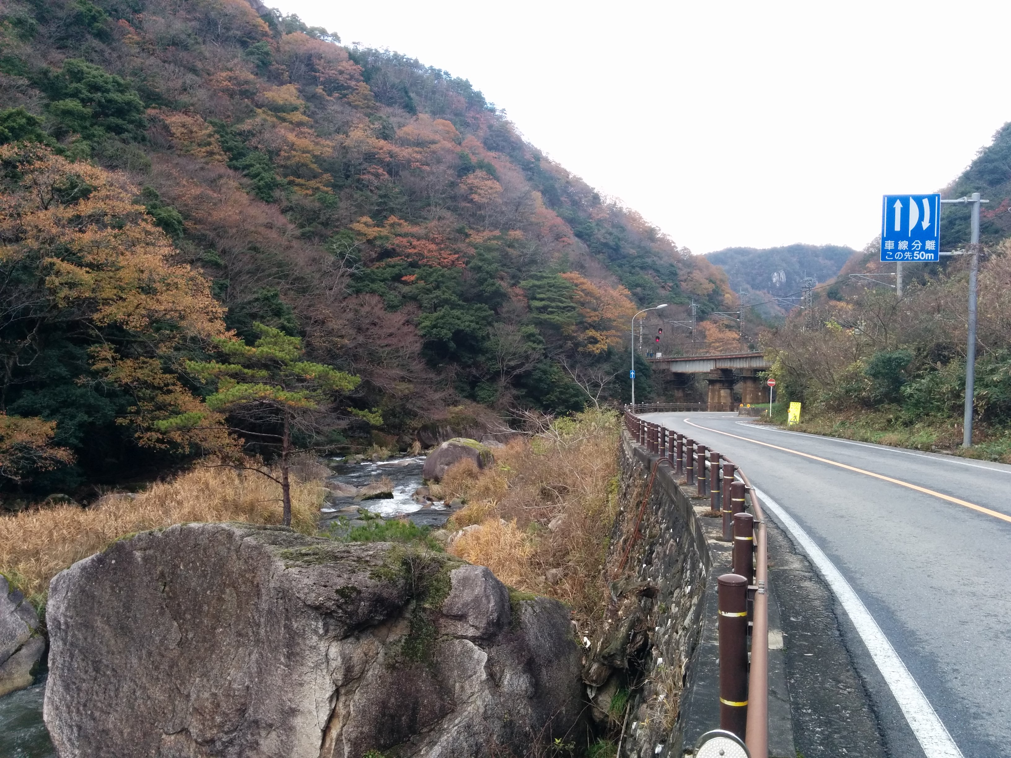 鳥取県日野郡日南町に位置する渓谷。景勝地。